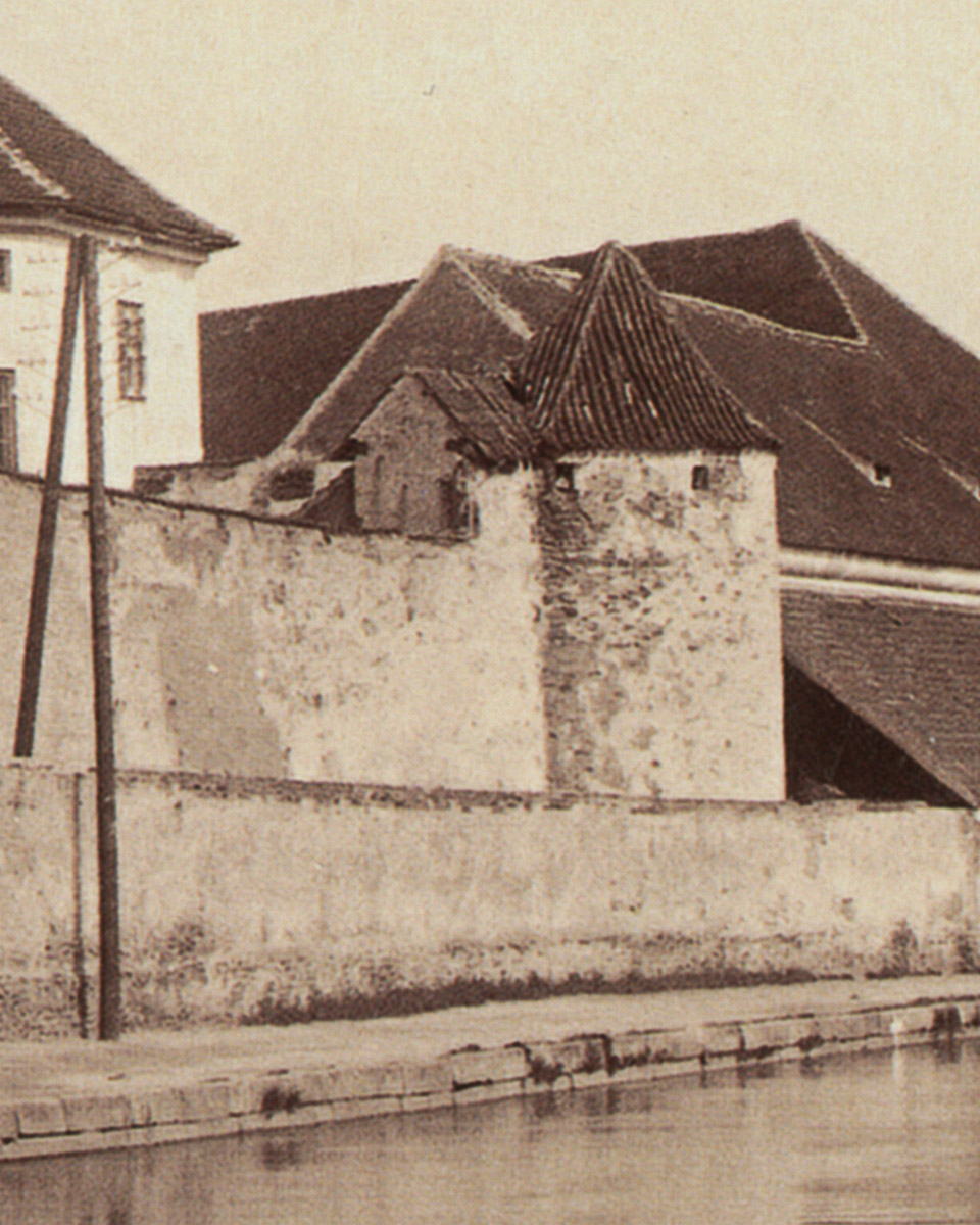 Klínovitá bašta na Zátkově nábřeží